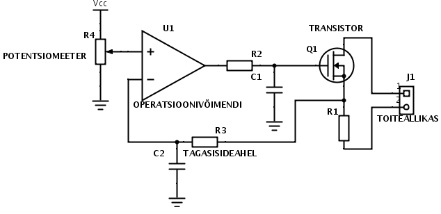 Skeem lihtsa elektroonilise koormusseadme tööpõhimõttega. Toiteallikas ühendatakse jadamisi transistori ja takistiga. Transistori avamist-sulgemist kontrollib operatsioonivõimendi, mis saab voolu kontrollimiseks pinged potentsiomeetrilt ja tagasisideahelast. Ostsilleerimise vähendamiseks on lisatud tagasisideahelasse ja transistori värati ette RC-filtrid.